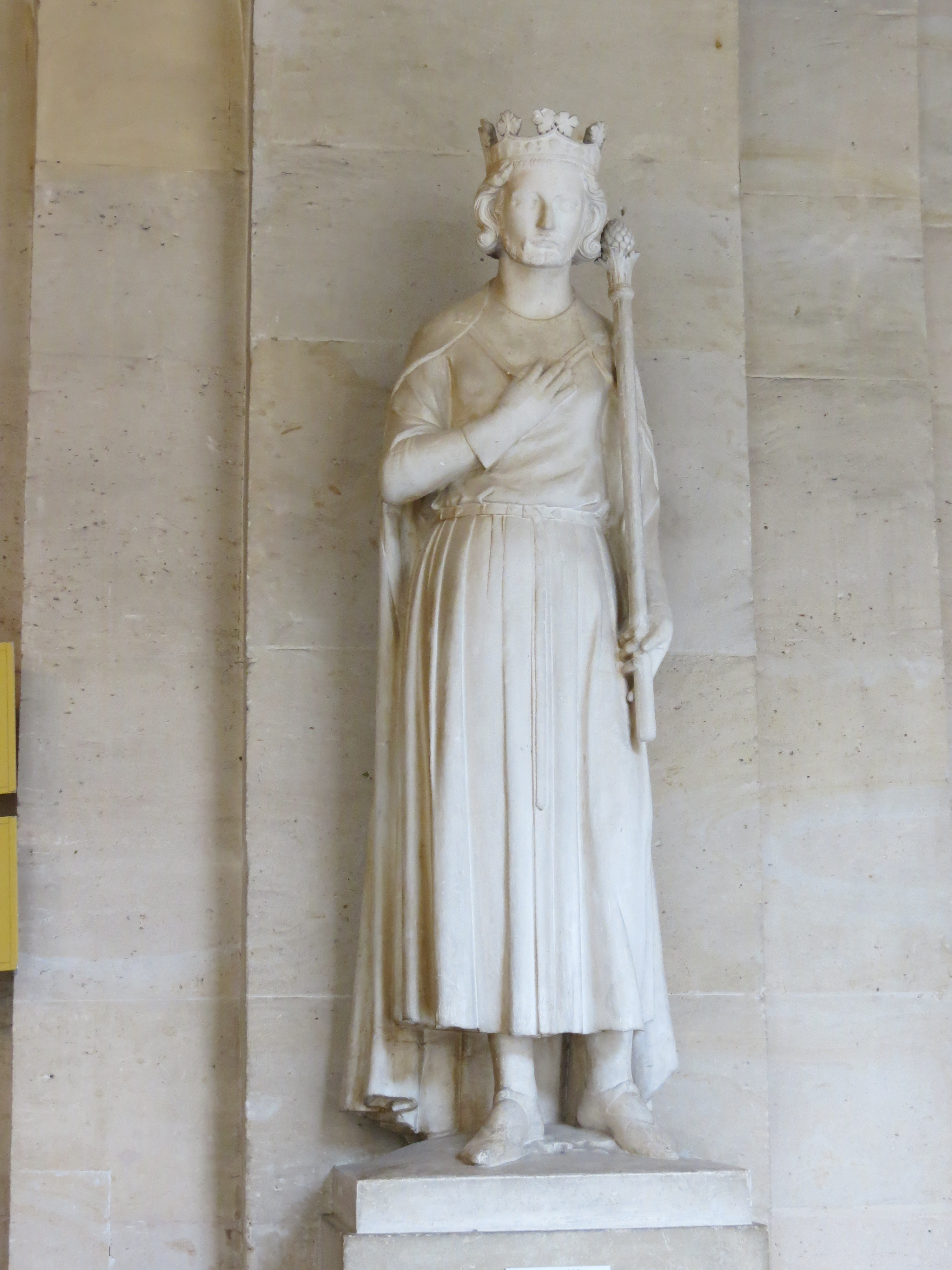 Statue de Carloman, en plâtre d'après une oeuvre du XIIIe siècle, réalisée en 1835.